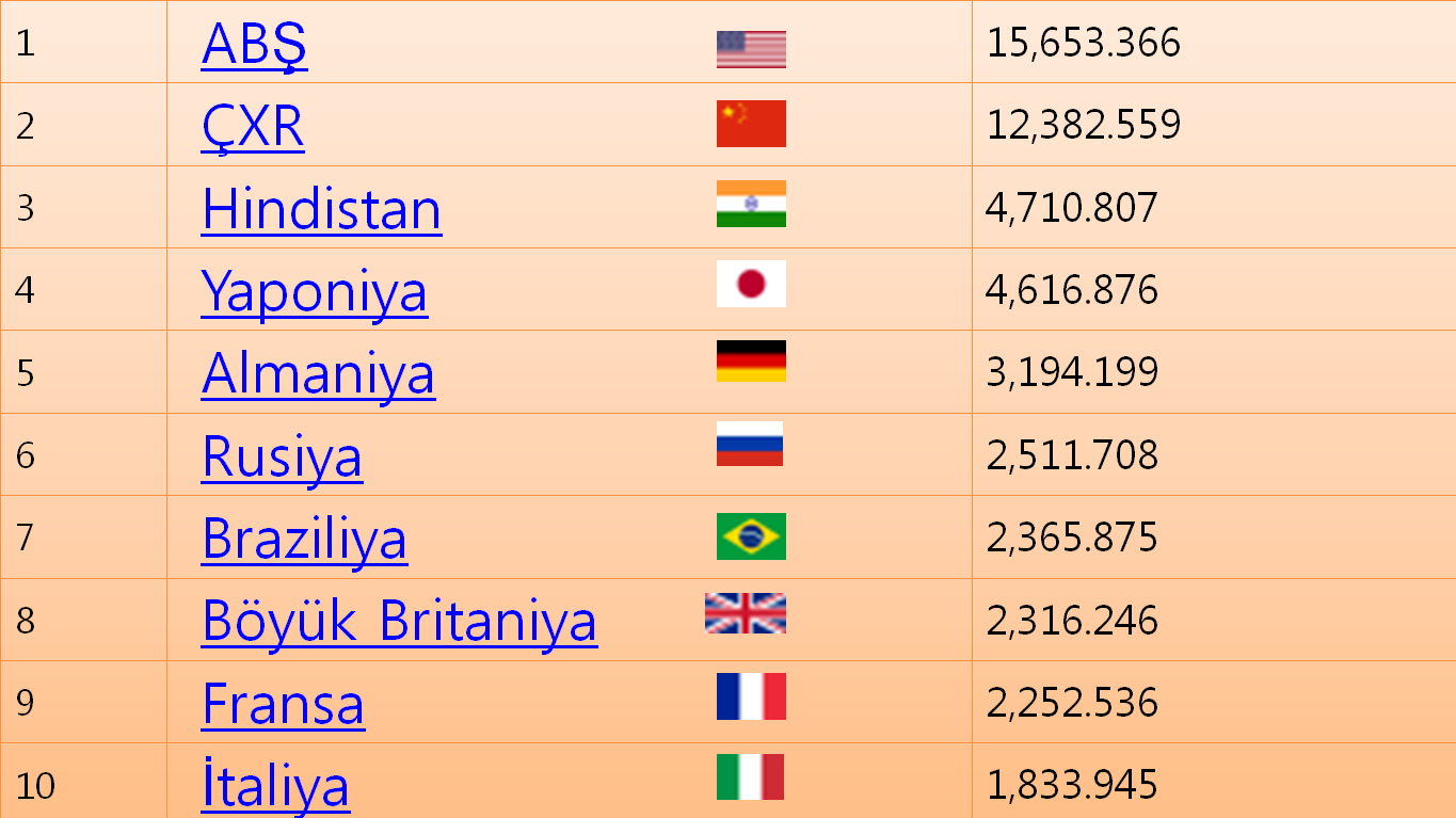 2012 ci il ÜDM həcminə görə sıralama